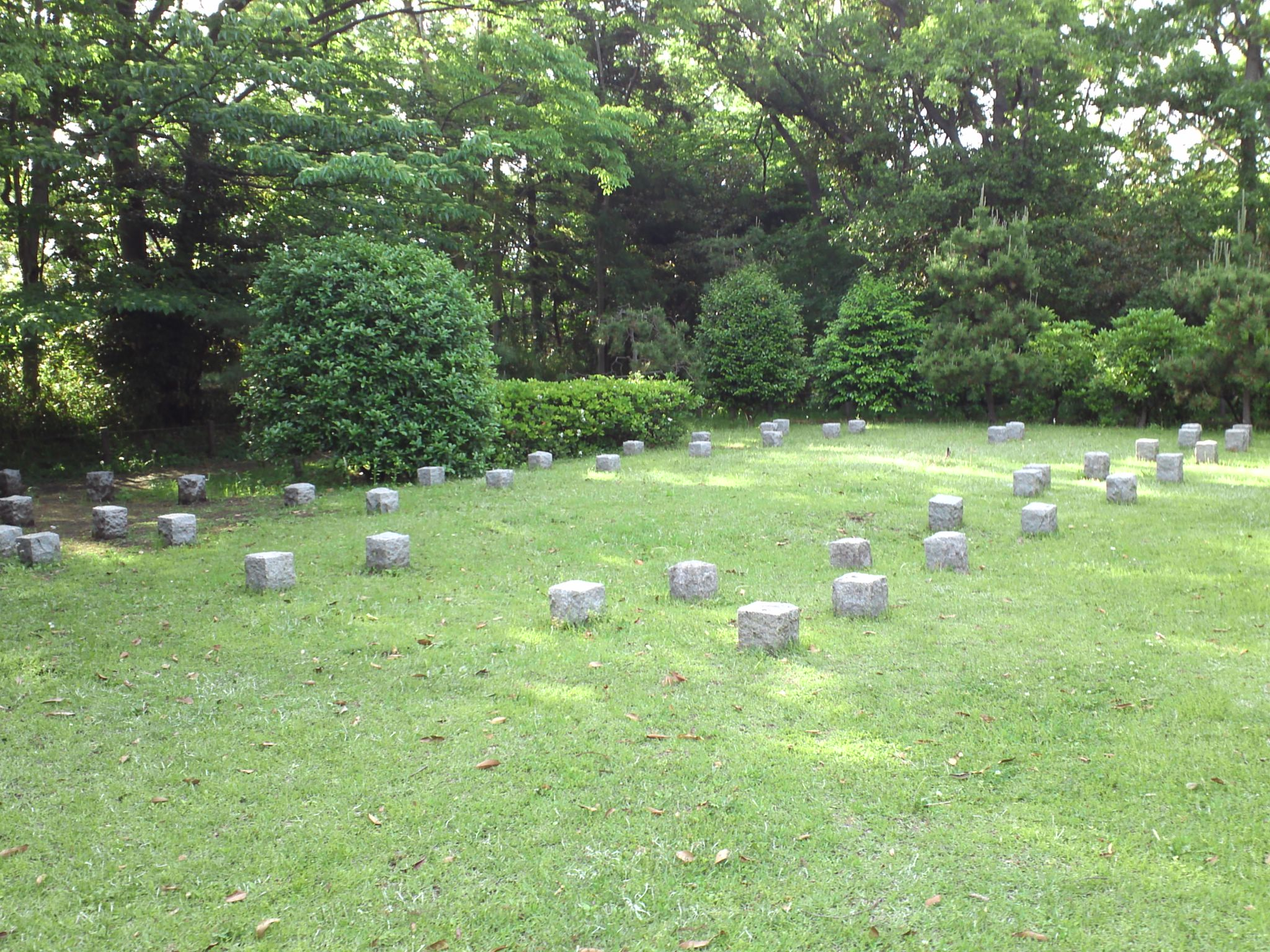 大庭城屋敷跡（神奈川県藤沢市）